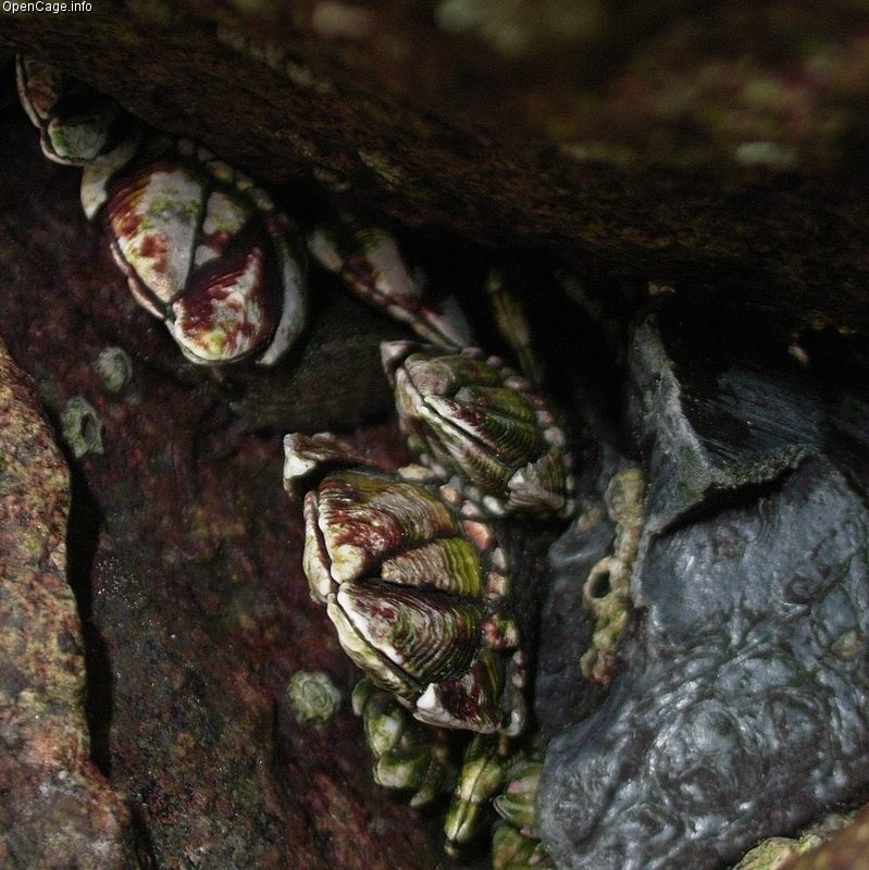 カメノテ Pollicipes mitella カメノテはこう見えても甲殻類の仲間。食べても美味しいらしい。 Location 宮崎県宮崎市青島 Copyright OpenCage